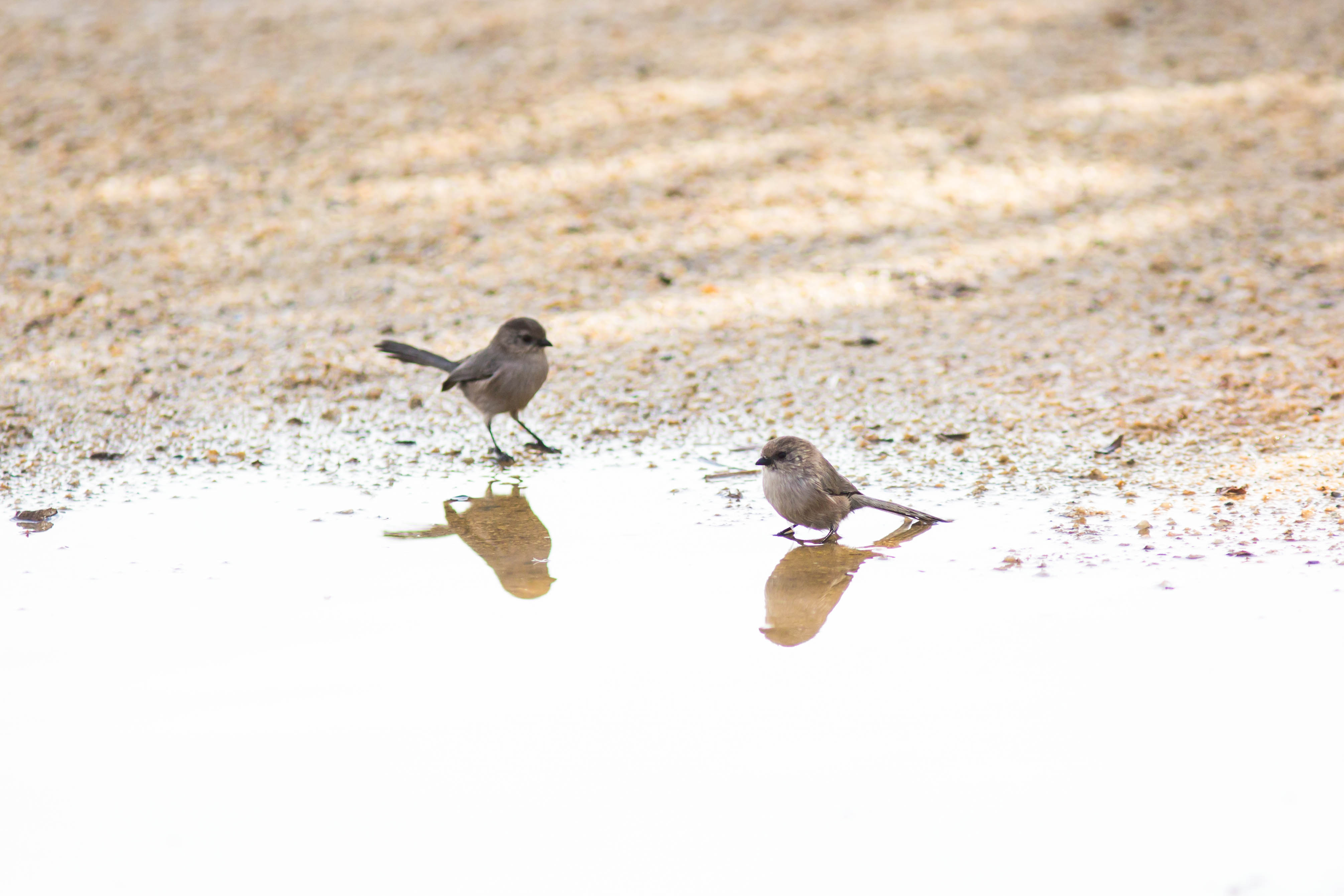 Bushtit